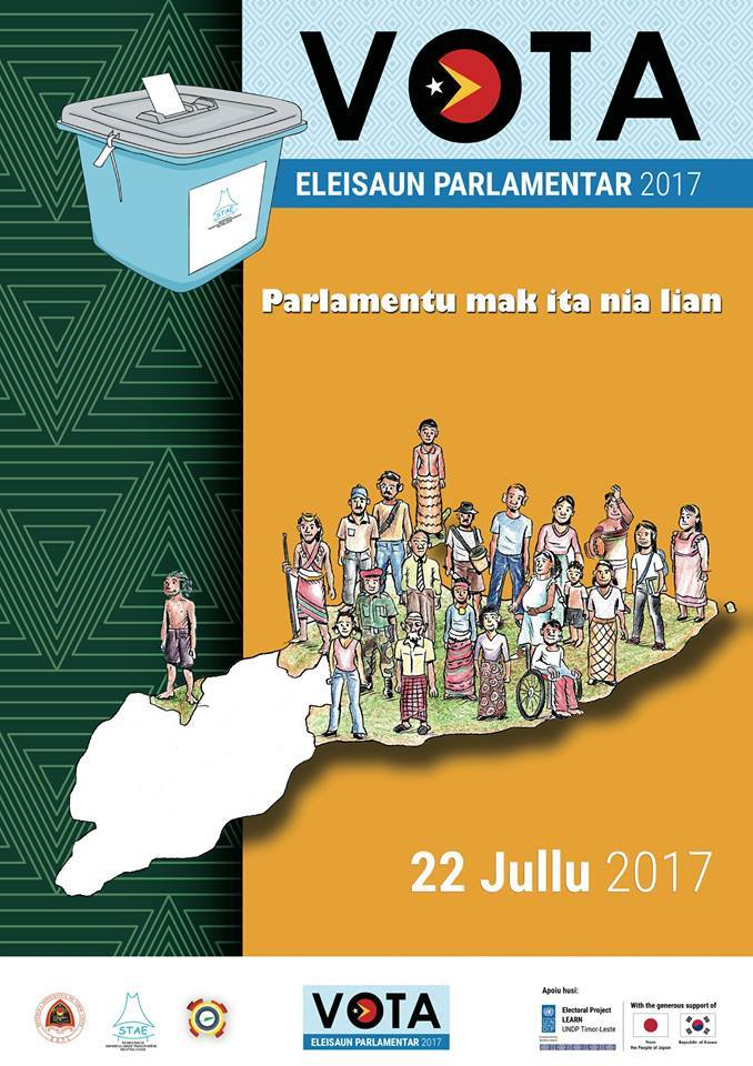 Plakat des Secreteriado Técnico de Administração Eleitoral mit dem Aufruf zur Teilnahme an den Parlamentswahlen 2017.